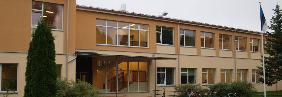 Pärnu Mai Kool